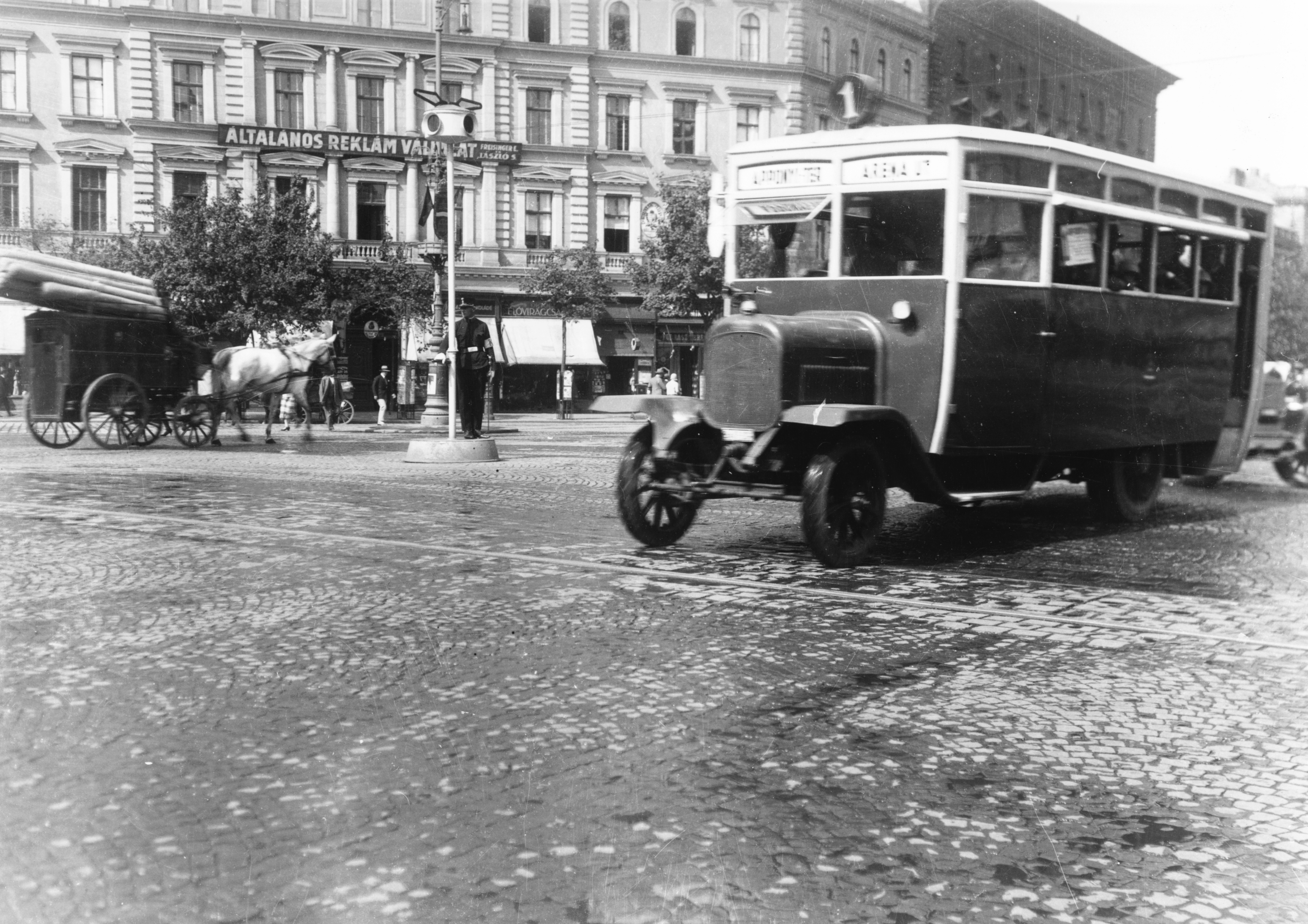 Oktogon, a busz a Városliget felől érkezik. Location: Hungary, Budapest VI. Tags: bus, sign-board, Budapest, street view, traffic, genre painting, coach, cop, signal, cobblestones Title: Oktogon, a busz a Városliget felől érkezik.